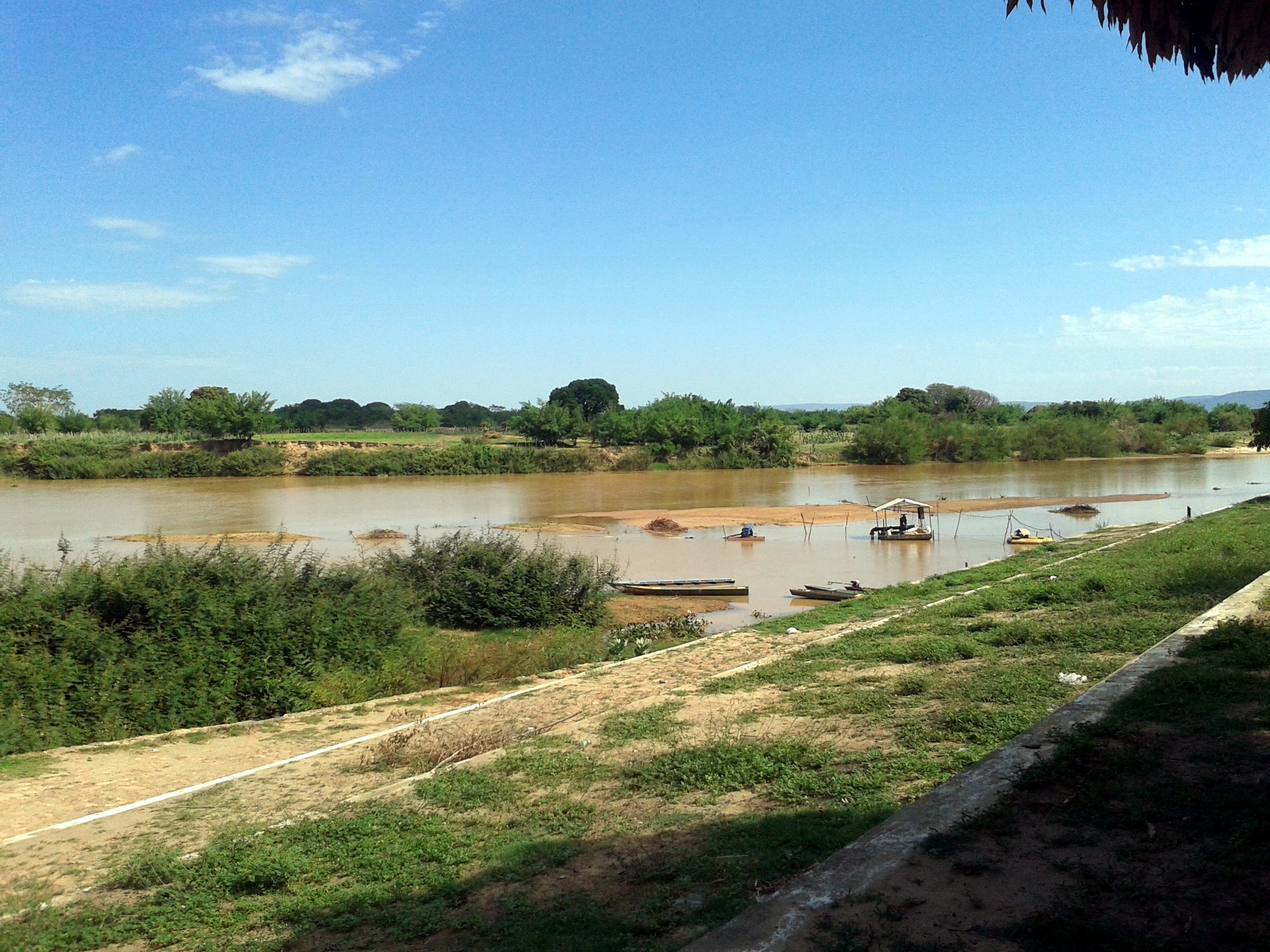 Rio São Francisco no porto de Paratinga, em dezembro de 2015.